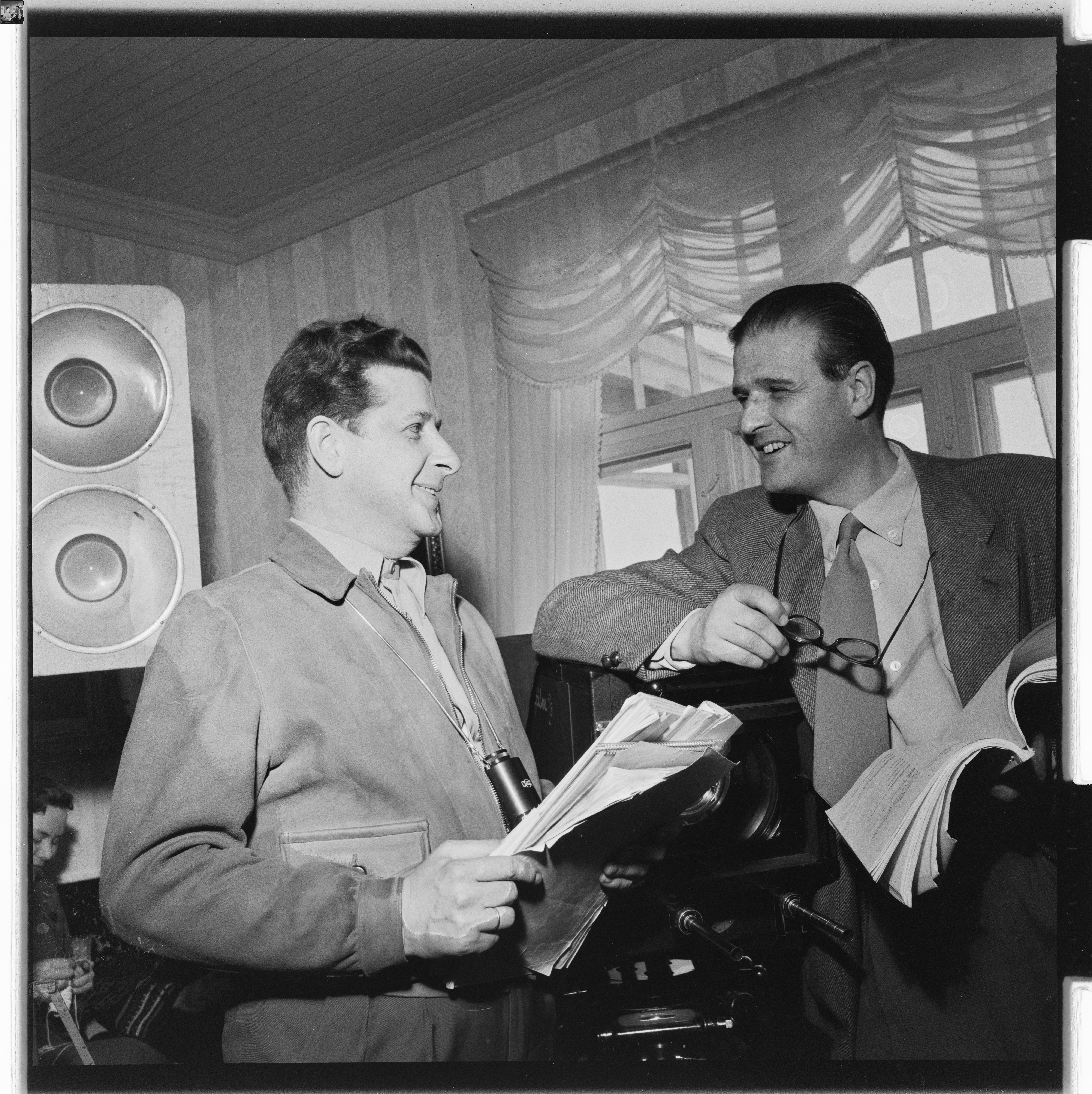 Bildet er hentet fra Arkivverket. Troll i ord fra Skeikampen Arkivinstitusjon : Riksarkivet Arkivnavn : Billedbladet NÅ Sted : Norge, Oppland, Gausdal, Skeikampen Emneord: Filminnspilling, Skuespillere Avbildet